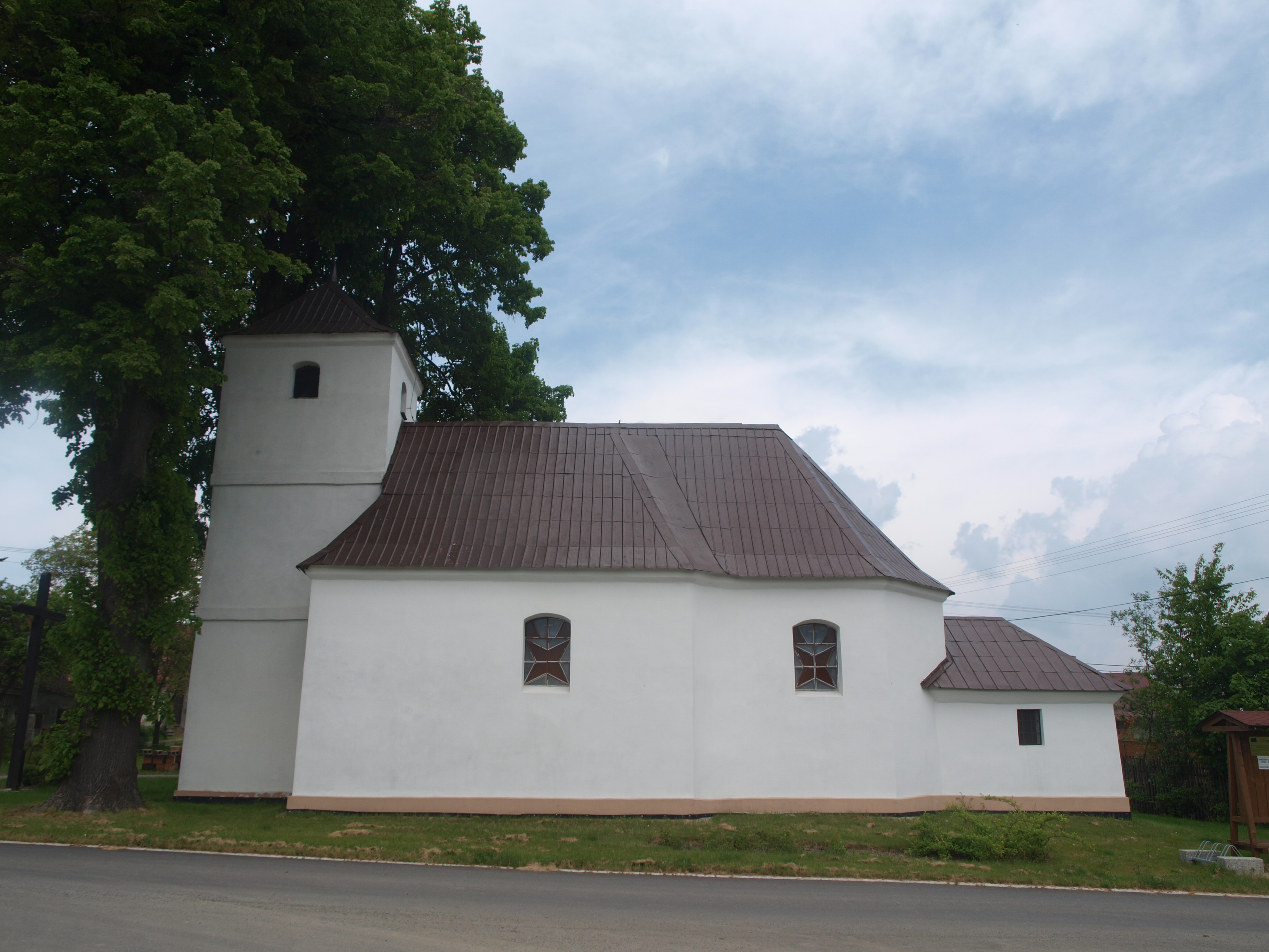 Kostelík v Karlově, místní části obce Paseka